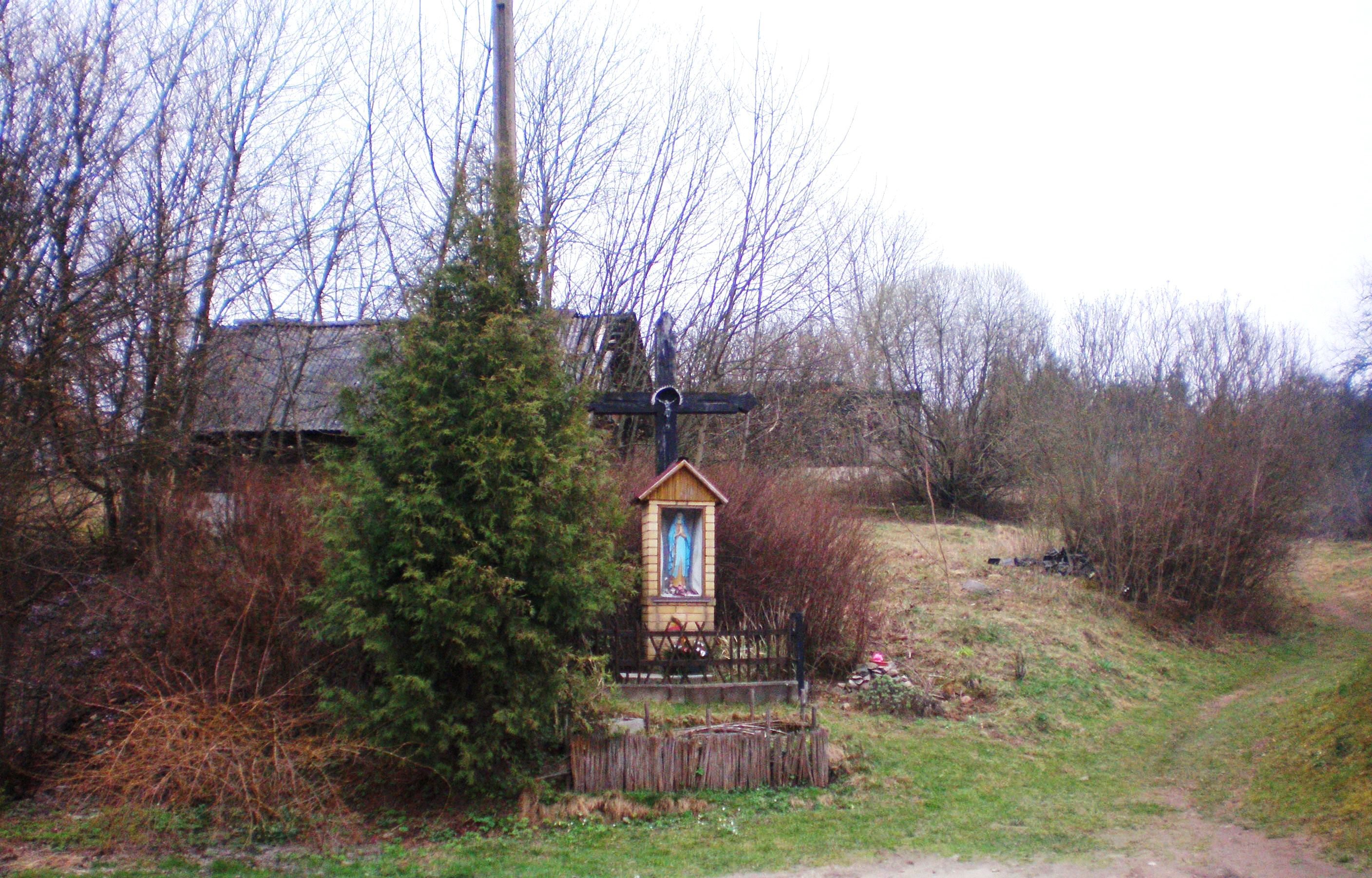 Kryžius, Moliakalnio g., Kalnai, Vilnius